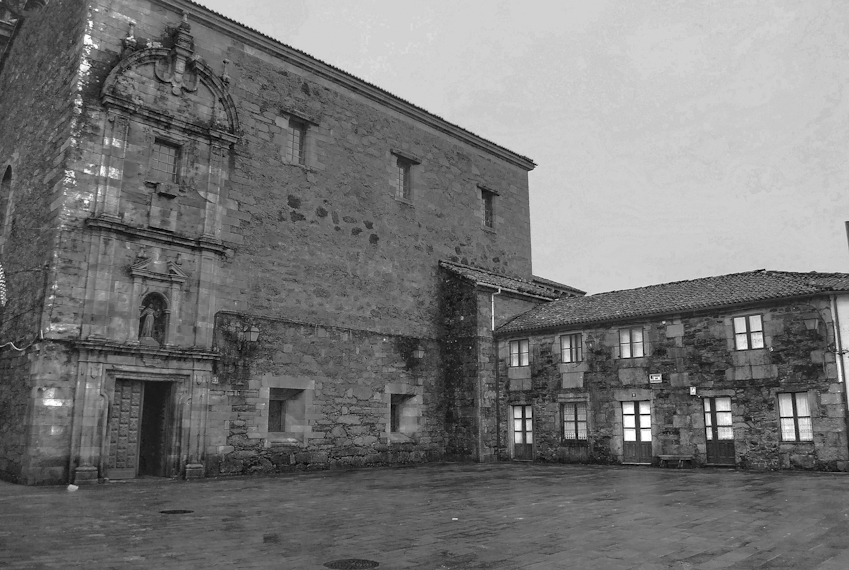 Igrexa e Convento Sancti Spiritus, Melide, Galiza